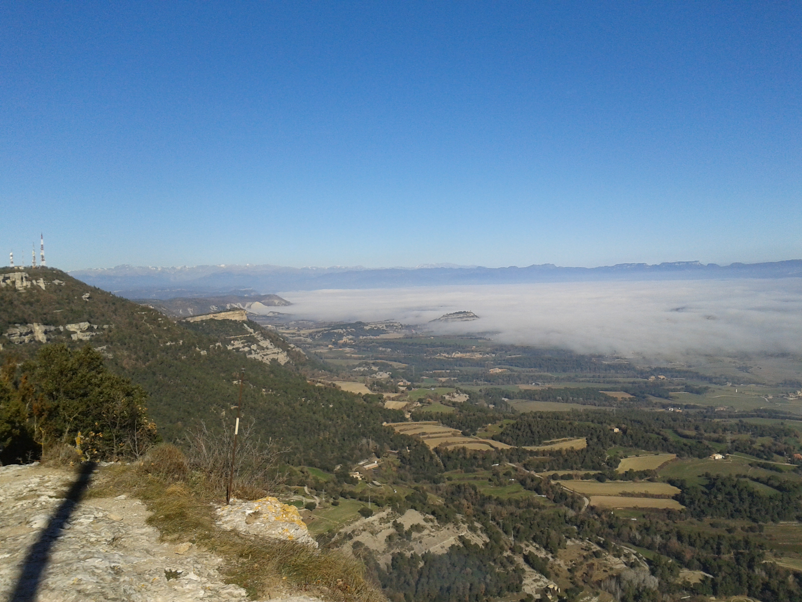 Puig Castellar